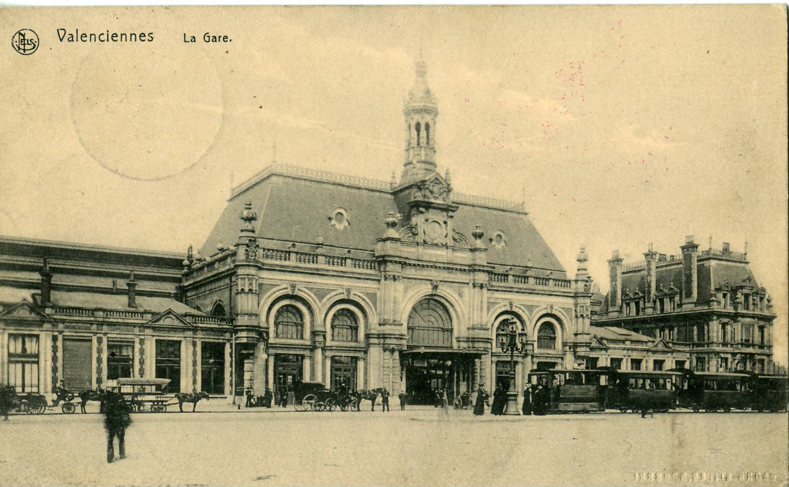 Carte postale ancienne éditée par NelsVALENCIENNES : La GareVue également d'une rame de l'ancien tramway de Valenciennes, en traction vapeur